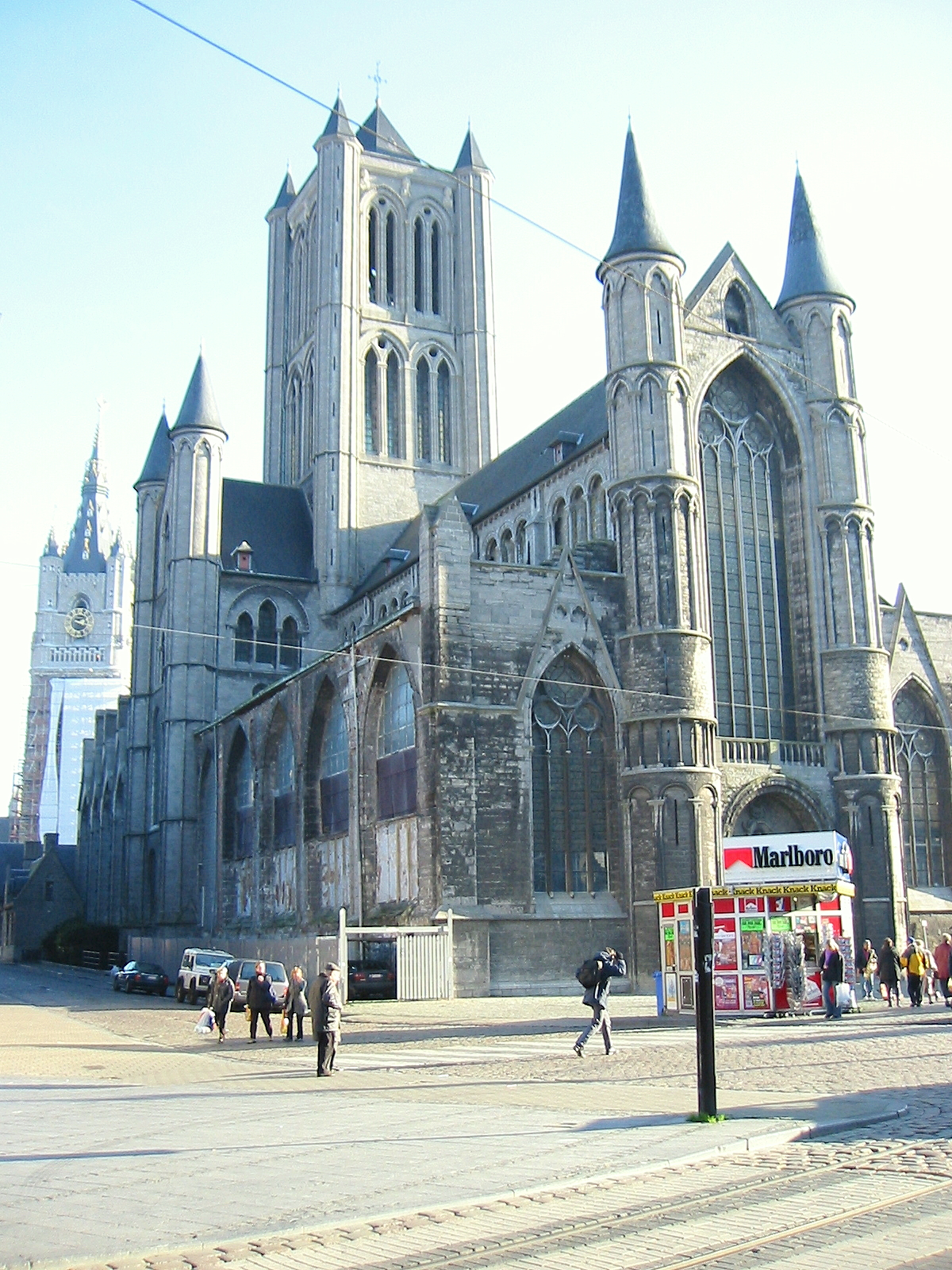 Sankt Nikolauskirche in Gent, Flandern